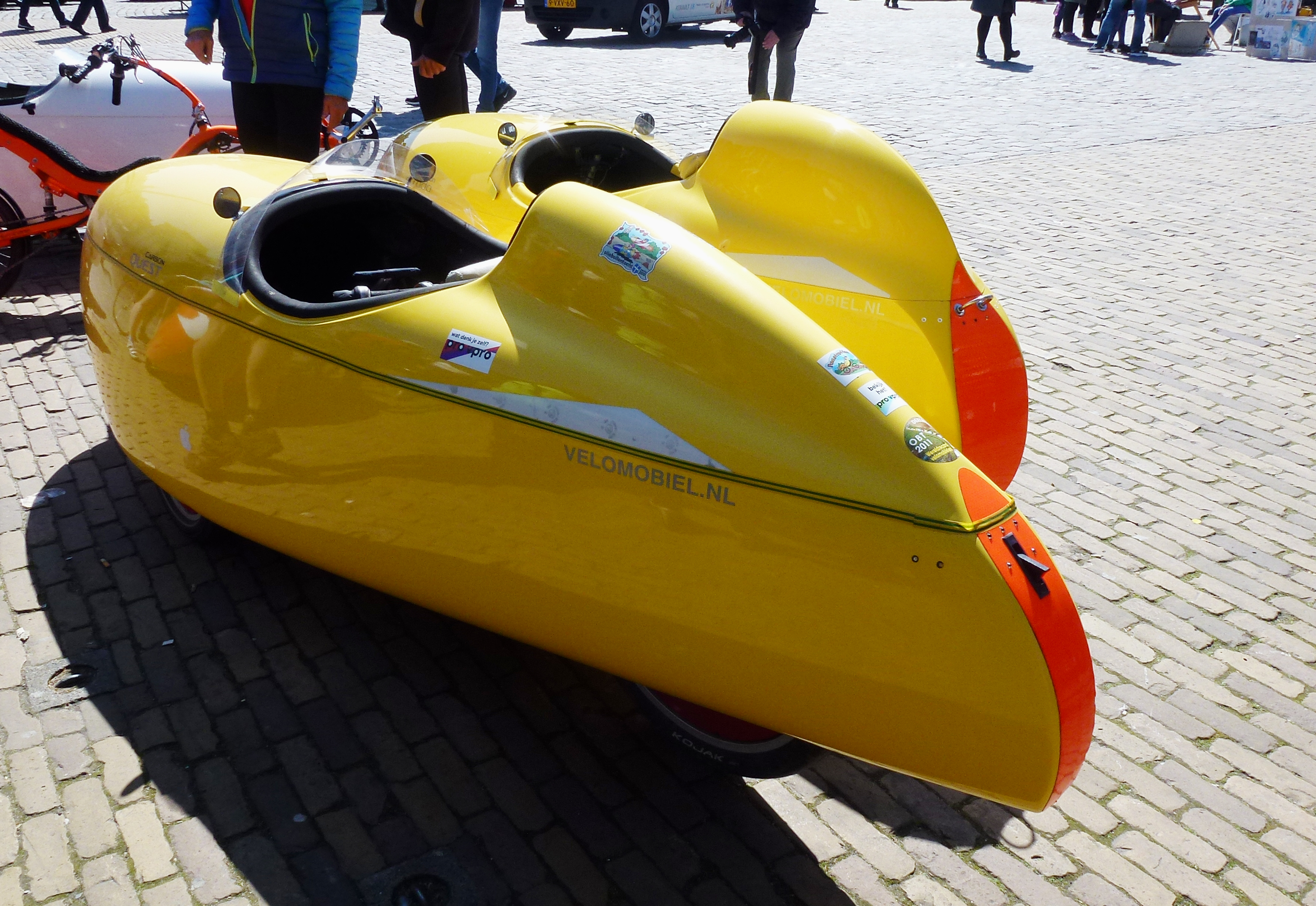 Strada Velomobiel Nederland. Waren te zien op de Markt in Gouda.